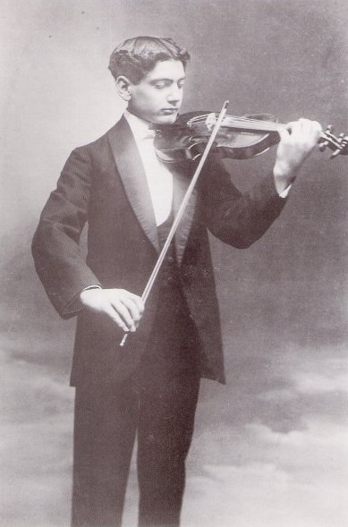 Manuel Quiroga aos 12 anos.